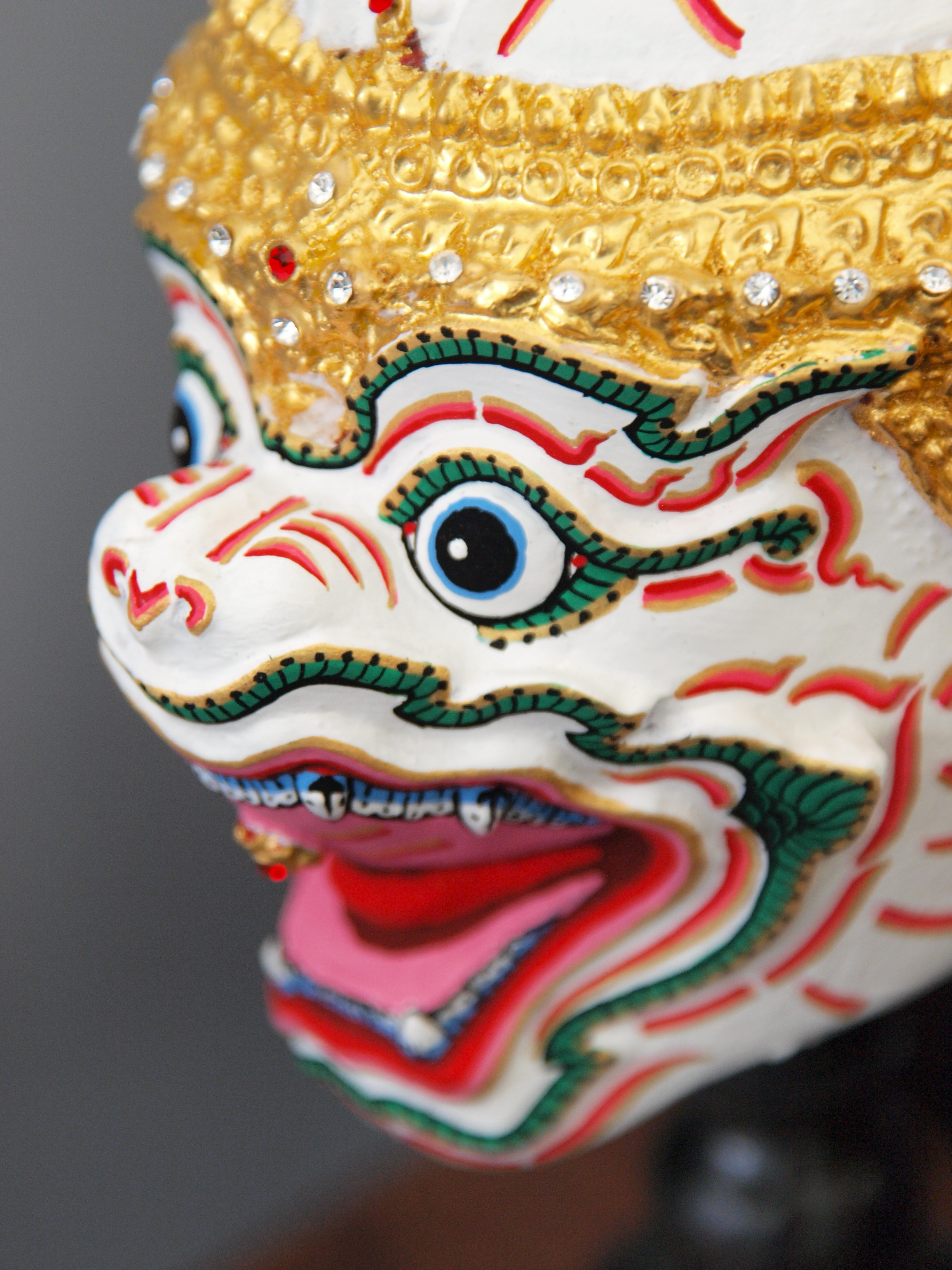 ภาพถ่ายหัวโขนหน้าลิง ตัวหนุมาน ถ่ายจากงาน "กรุงเทพฯ ถนนวัฒนธรรม" ของดีเขตบางพลัด ระหว่างวันที่ 1-5 กันยายน 2553